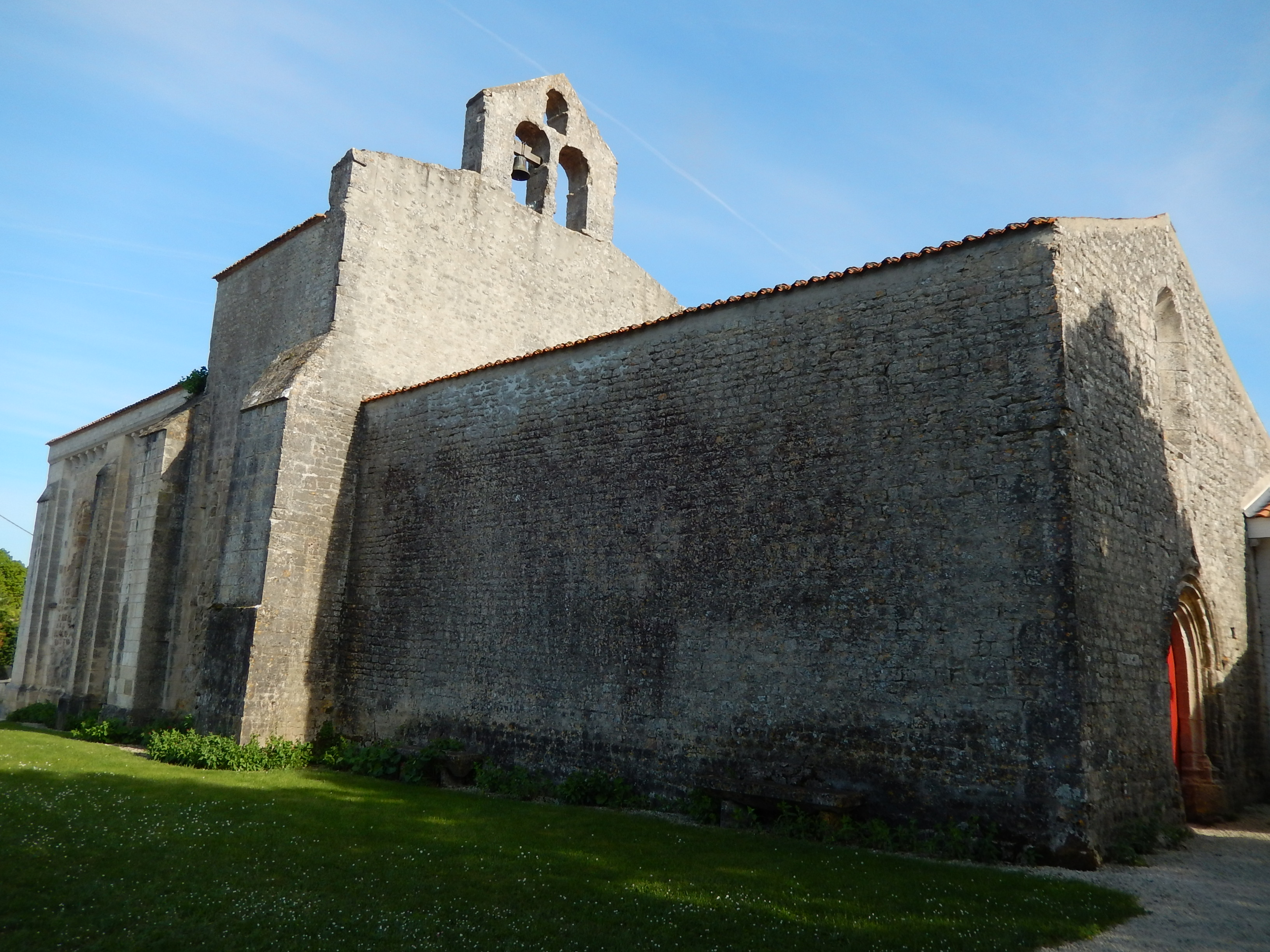 L'église Saint-Révérend de La Croix-Comtesse (Charente-Maritime, France). Façades nord et ouest.